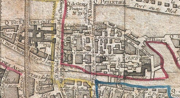 La rue de la Vieille-Draperie en 1797 - Plan de Jean